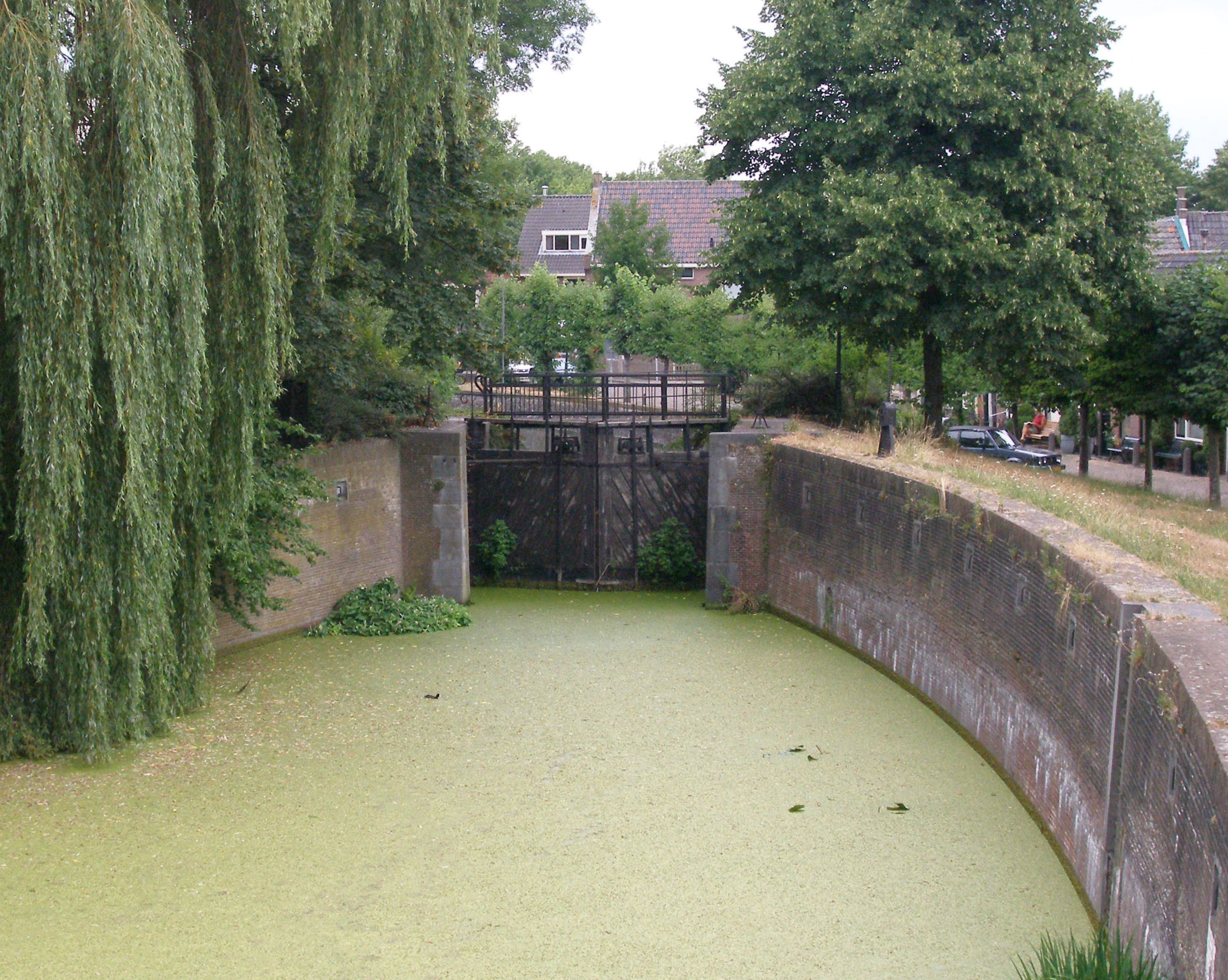 Old outlet sluice (dutch: spuisluis), Vreeswijk